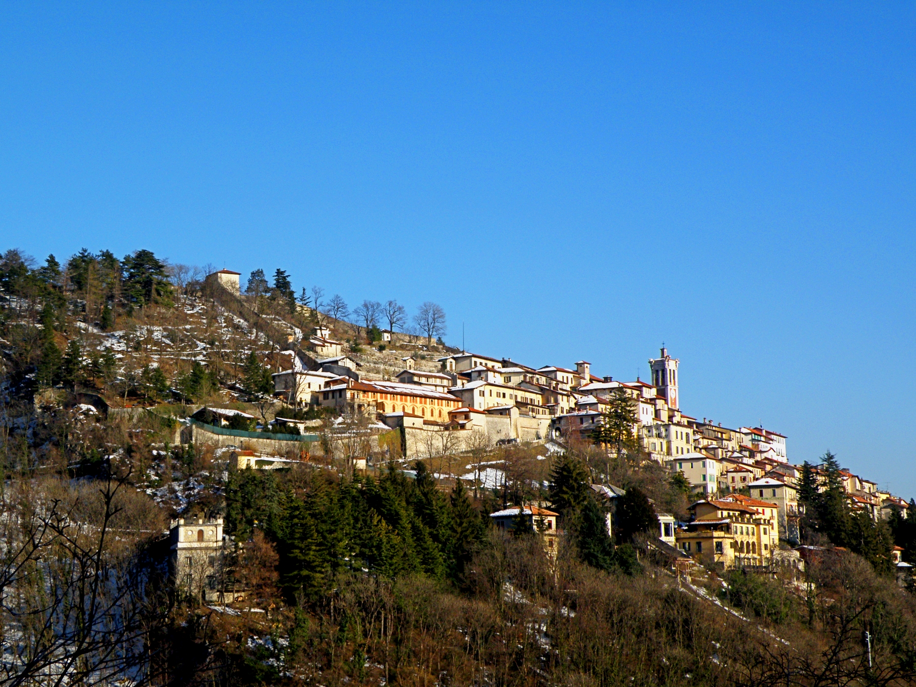 Frazione di Santa Maria del Monte (VARESE - ITALIA)